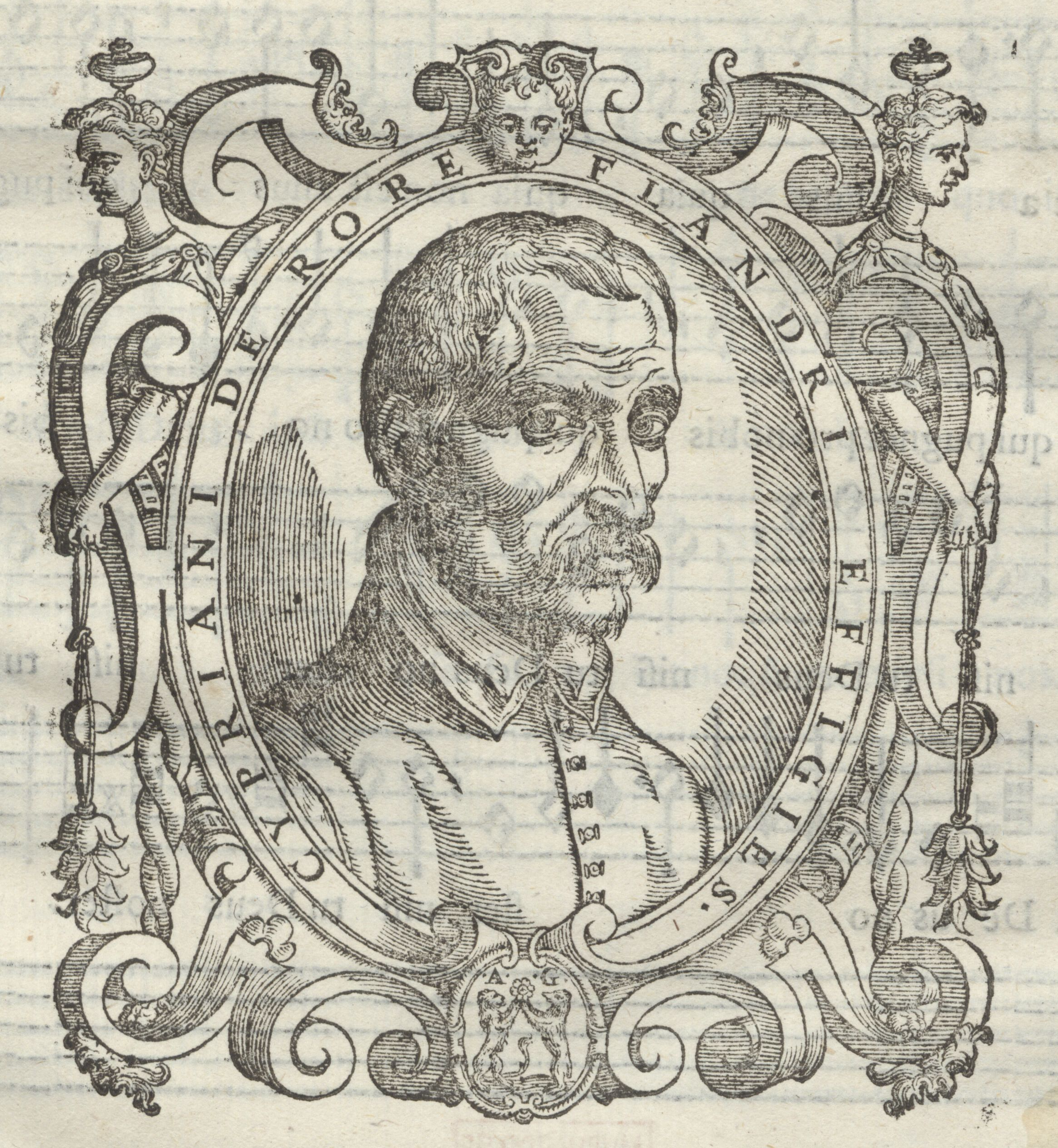 Effigie di Cipriano de Rore tratta dal frontespizio delle Sacrae Cantiones del 1595 – url